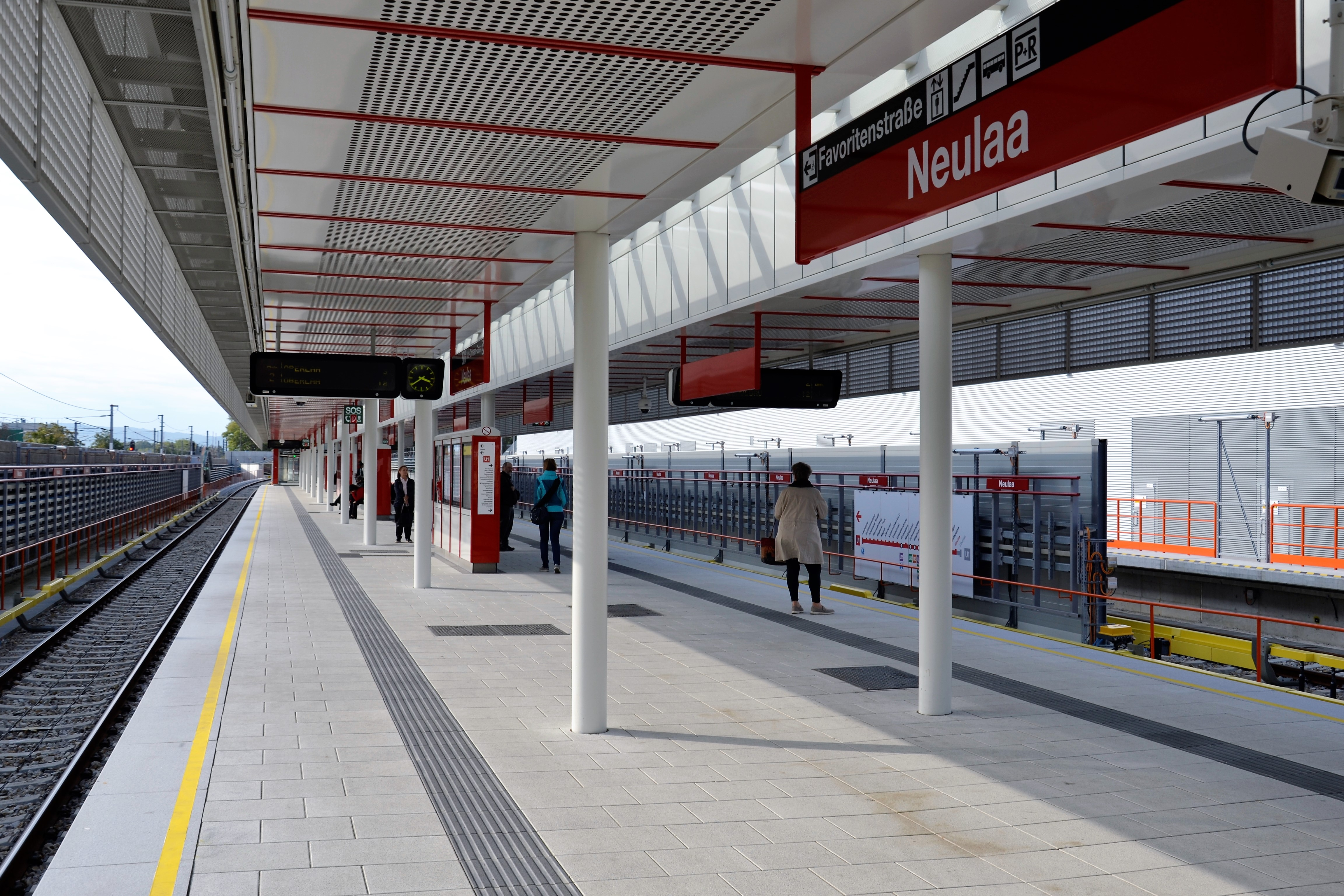 Die U-Bahn-Station Neulaa ist eine U-Bahn-Station der U-Bahn-Linie U1 in Wien. Auf dieser Aufnahme ist der Bahnsteig Anfang Oktober 2017, knapp einen Monat nach der Eröffnung, zu sehen.